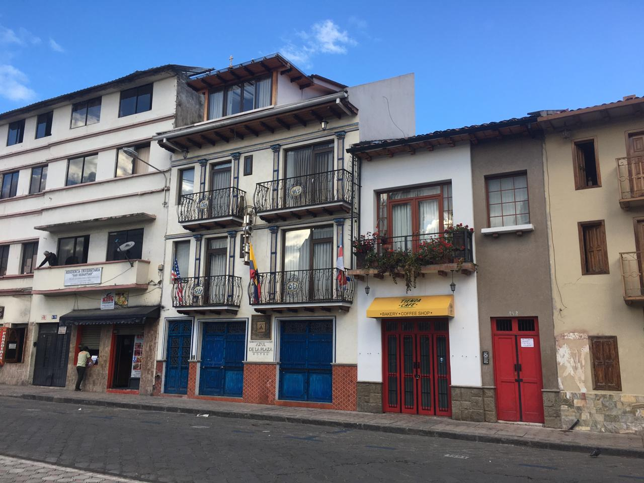 servicios varios que ofrece la parroquia de San Sebastian